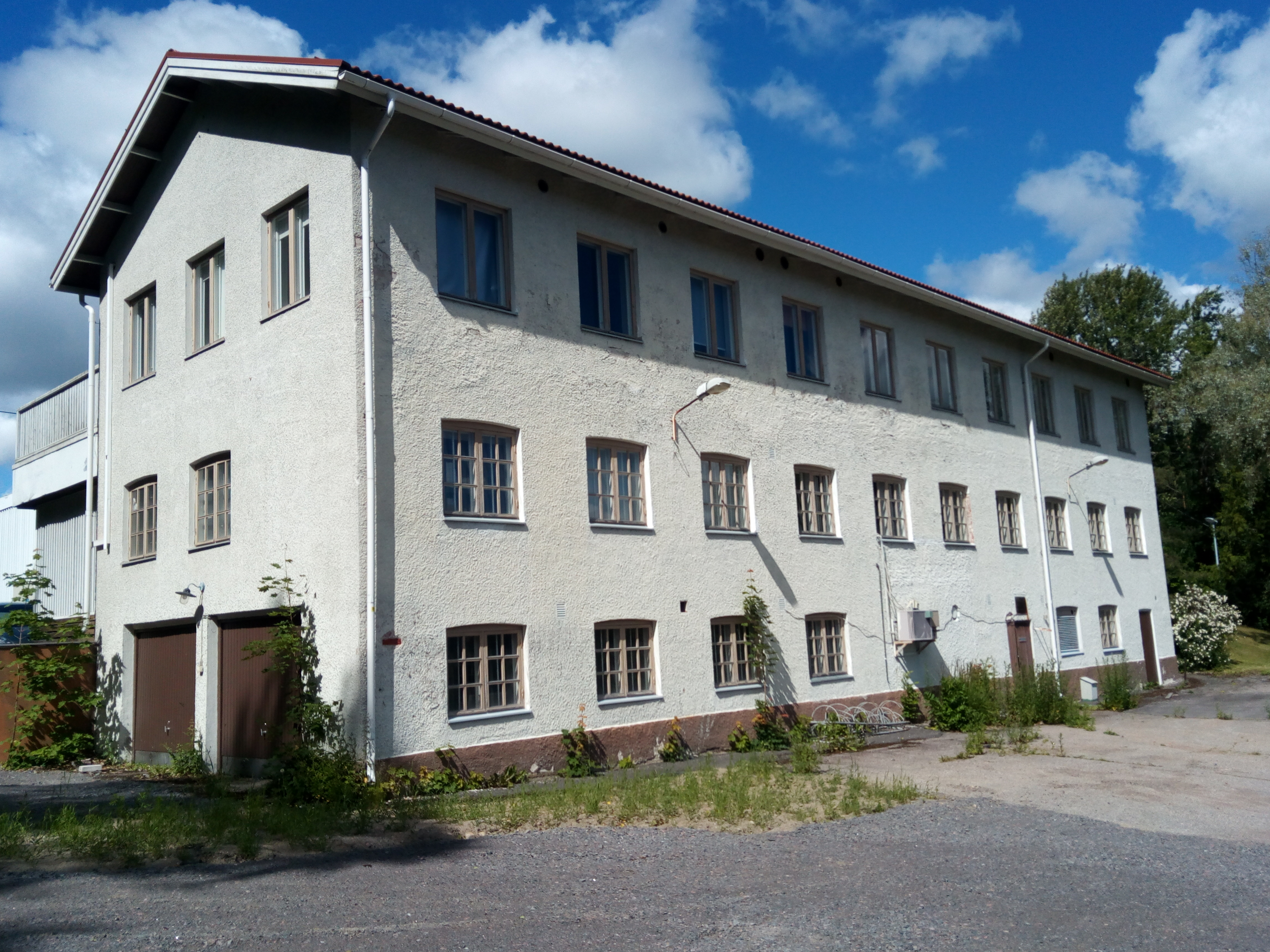 Turun Peiteteollisuus